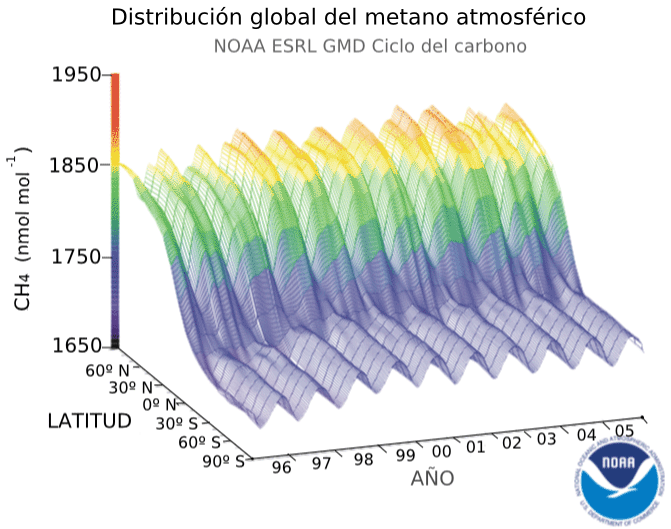 Aquest gràfic exposa el resultat de les observacions de metà des de 1996 a 2005 que mostren l'augment del metà, les variacions estacionals i la diferència entre els hemisferis nord i sud.